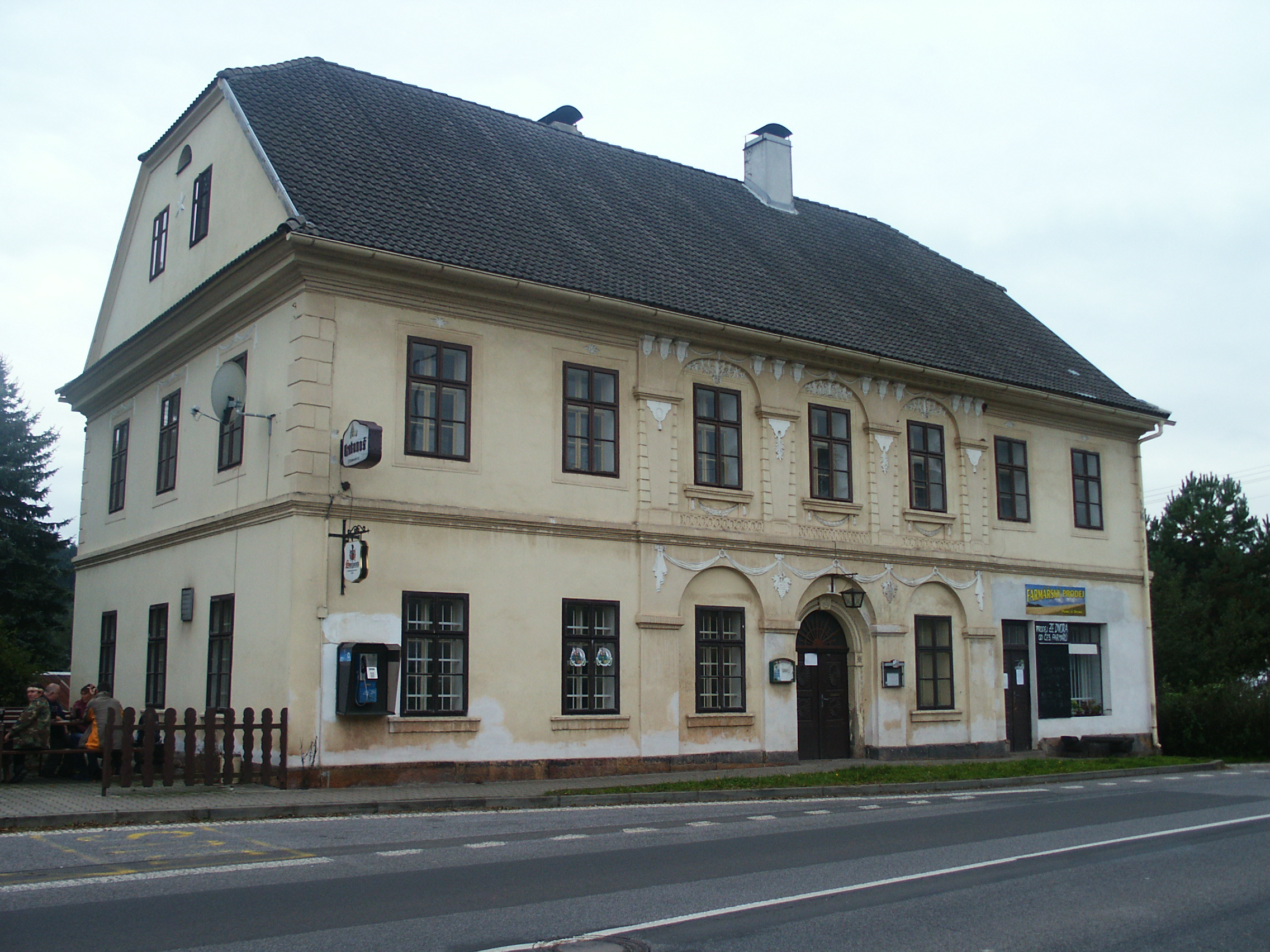 Venkovský dům (Dolní Olešnice), Vestřev 92